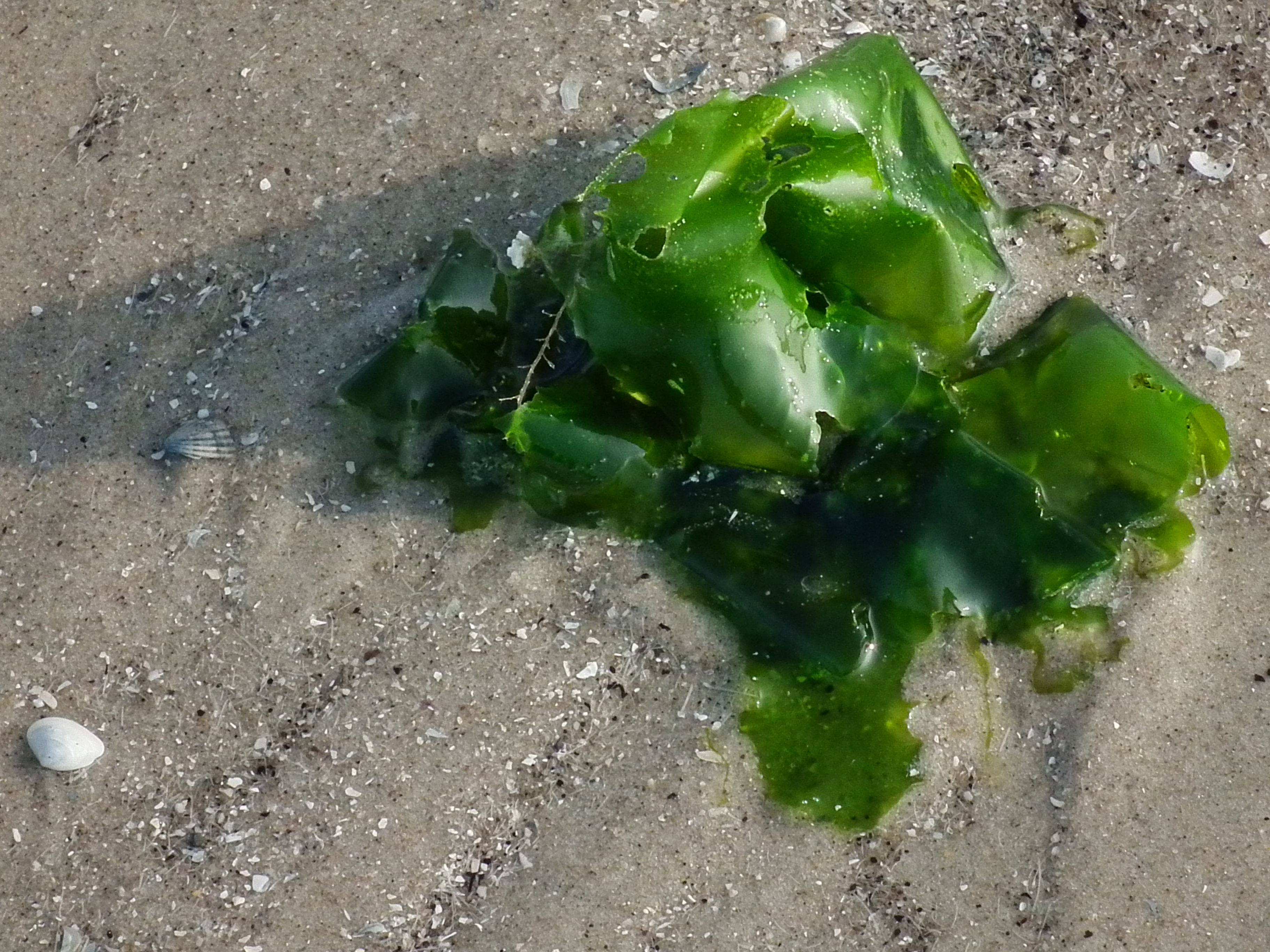 Meersalat (Ulva lactuca) im Spülsaum der ostfriesischen Nordseeinsel Juist (Niedersachsen, Deutschland)